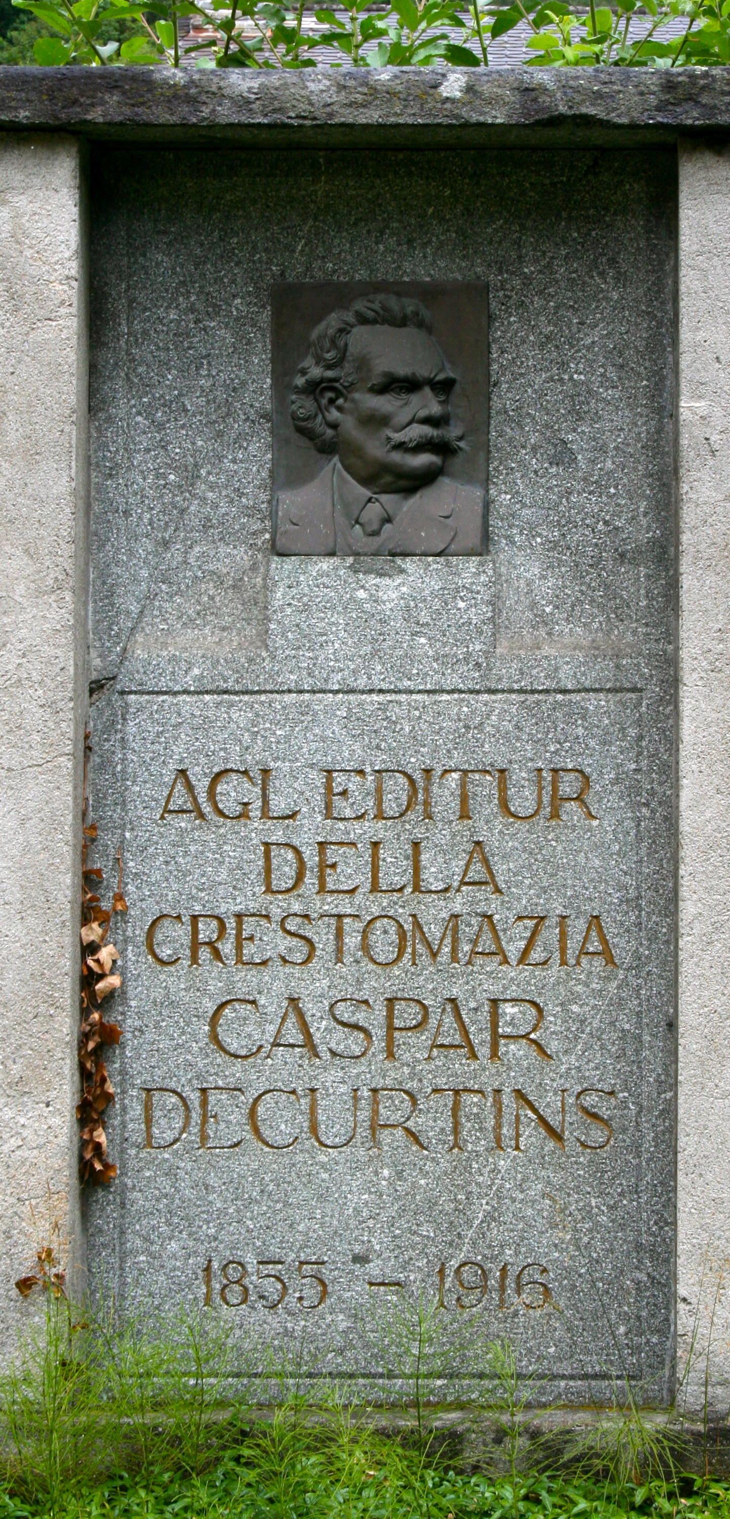 Gedenktafel für